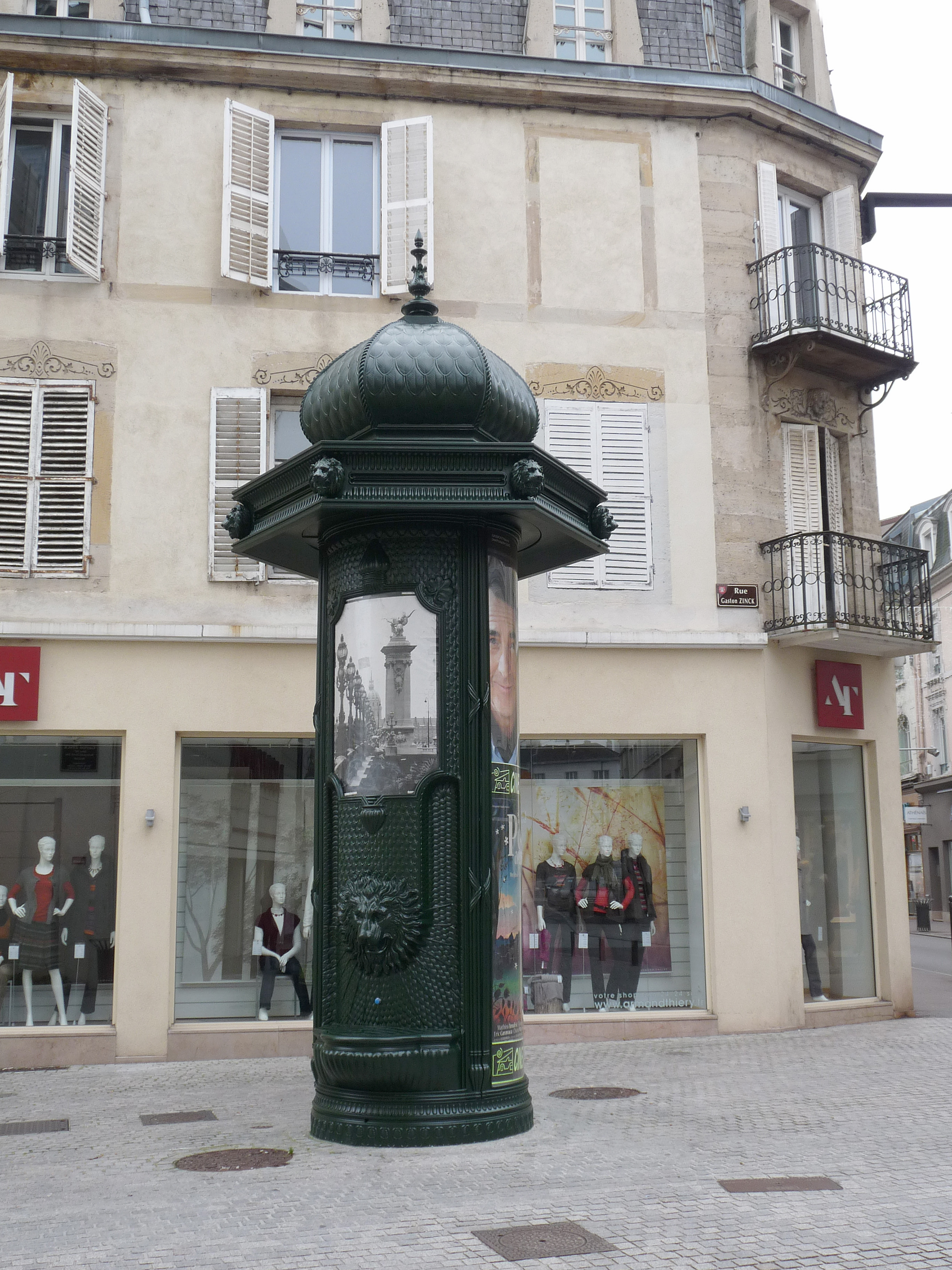 Epinal, rue Gaston Zinck : colonne Morris